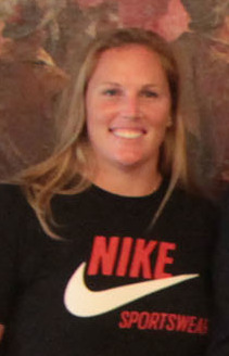 Buenos Aires, 19 de Noviembre de 2012. El jefe de Gobierno de la ciudad de Buenos Aires, Mauricio Macri, recibió hoy al atleta cubano Javier Sotomayor. El encuentro, celebrado en el Salón Blanco del palacio municipal, también contó con la presencia de los atletas argentinos Federico Molinari, Alejandra García, Carlos Gats, Jennifer Dahlgren y Carlos Laloy. Fotos: Matías Repetto-gv/GCBA